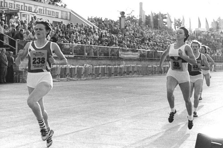 Christine Liebetrau, Cristiane Stoll, Barbara Liebich ADN-ZB Kluge 1-7-77 Dresden: DDR-Leichtathletik-Meisterschaften-2.Tag- Im Finale über 800 m siegte mit der Weltjahresbestleistung von 1:59,0 min. die Erfurterin Christine Liebetrau (l.) vor Cristiane Stoll (1:59,5 min.) und Barbara Liebich (2:00,0 min) .